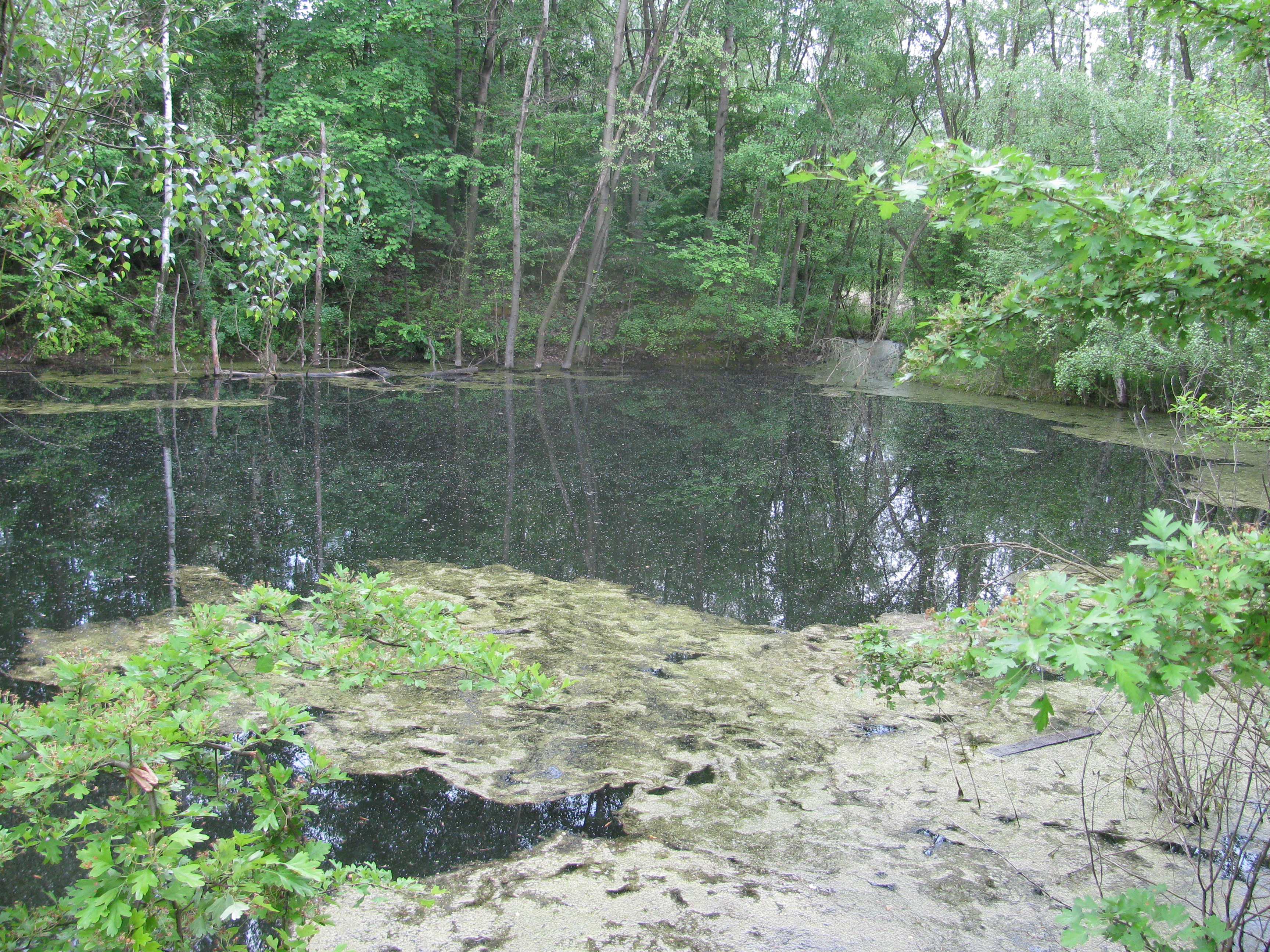 Ziegeleigrube Torna, seit 2014 Teil des Naturschutzgebiets Ziegeleigruben Prohlis und Torna